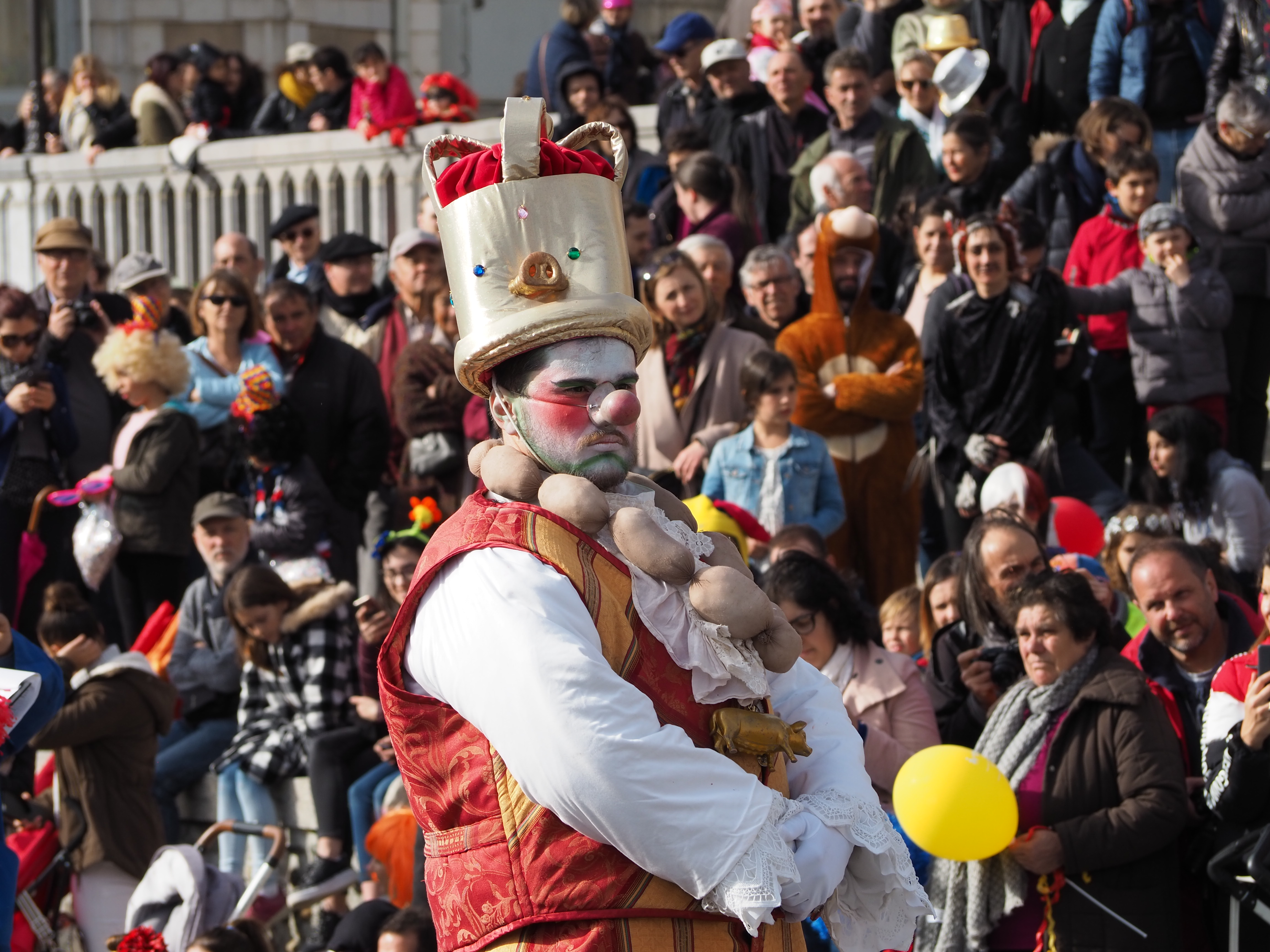 Sent Pançard au carnaval biarnès, Pau 2019.